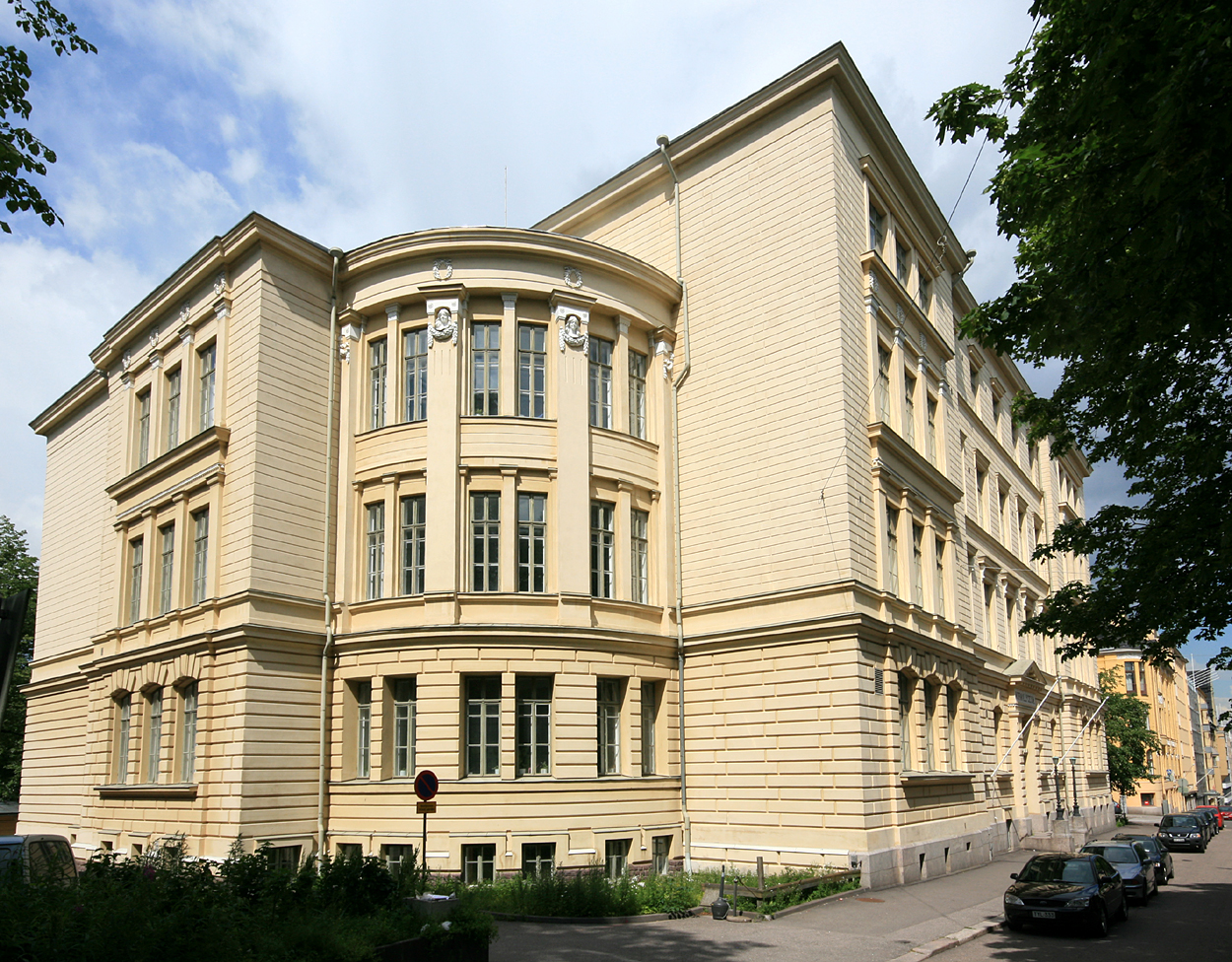 Ruotsalainen Normaalilyseo Svenska normallyceum), Fabianinkatu 1 / Unioninkatu 2 / Bernhardinkatu 6, Helsinki. Arkkitehti: Axel Hampus Dahlström. Rakennusvuosi: 1880.